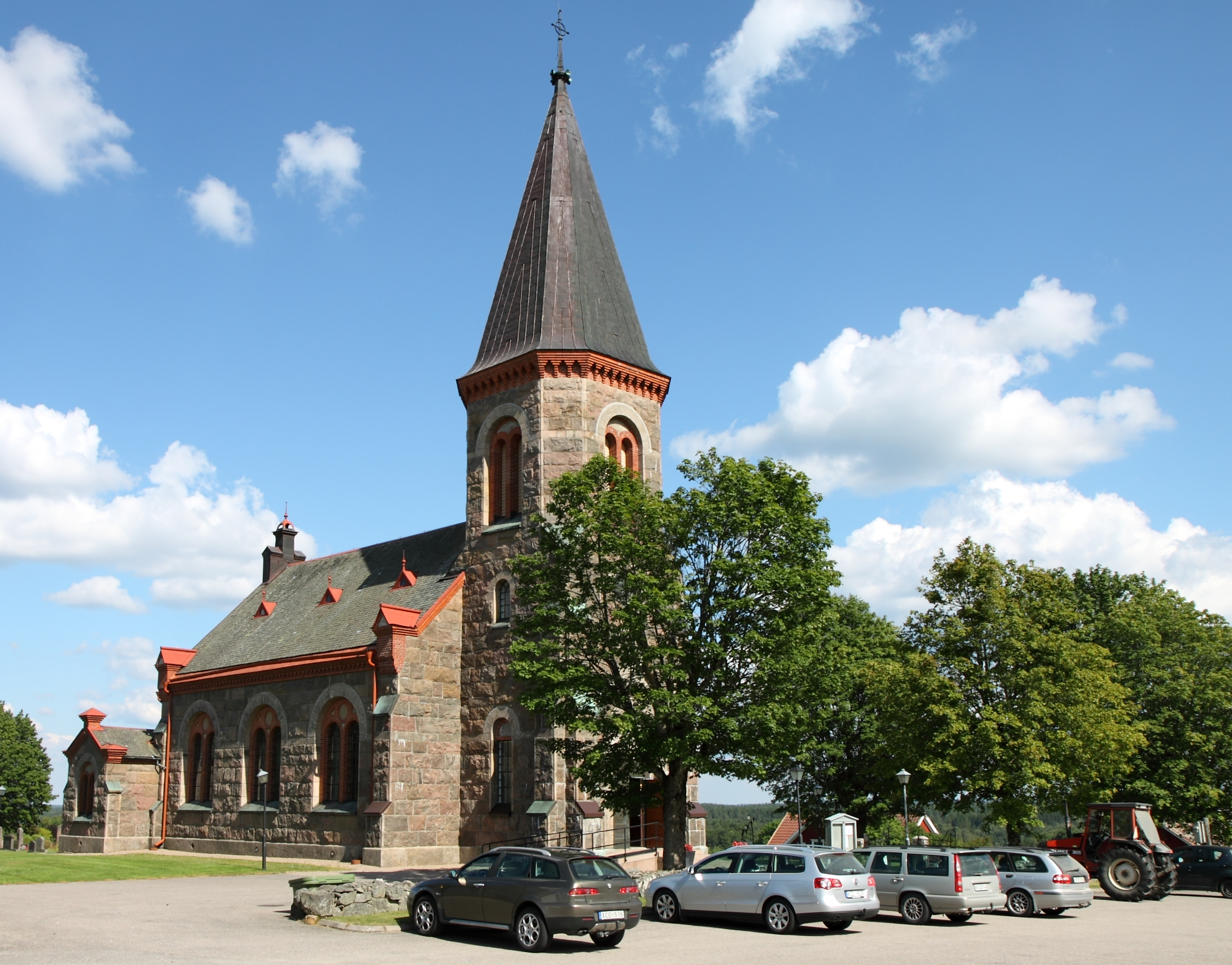 Ornunga kyrka.